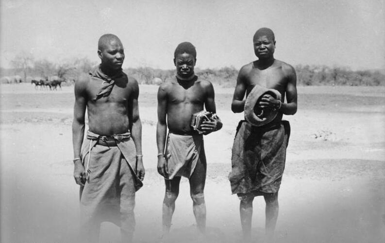 Ovambos